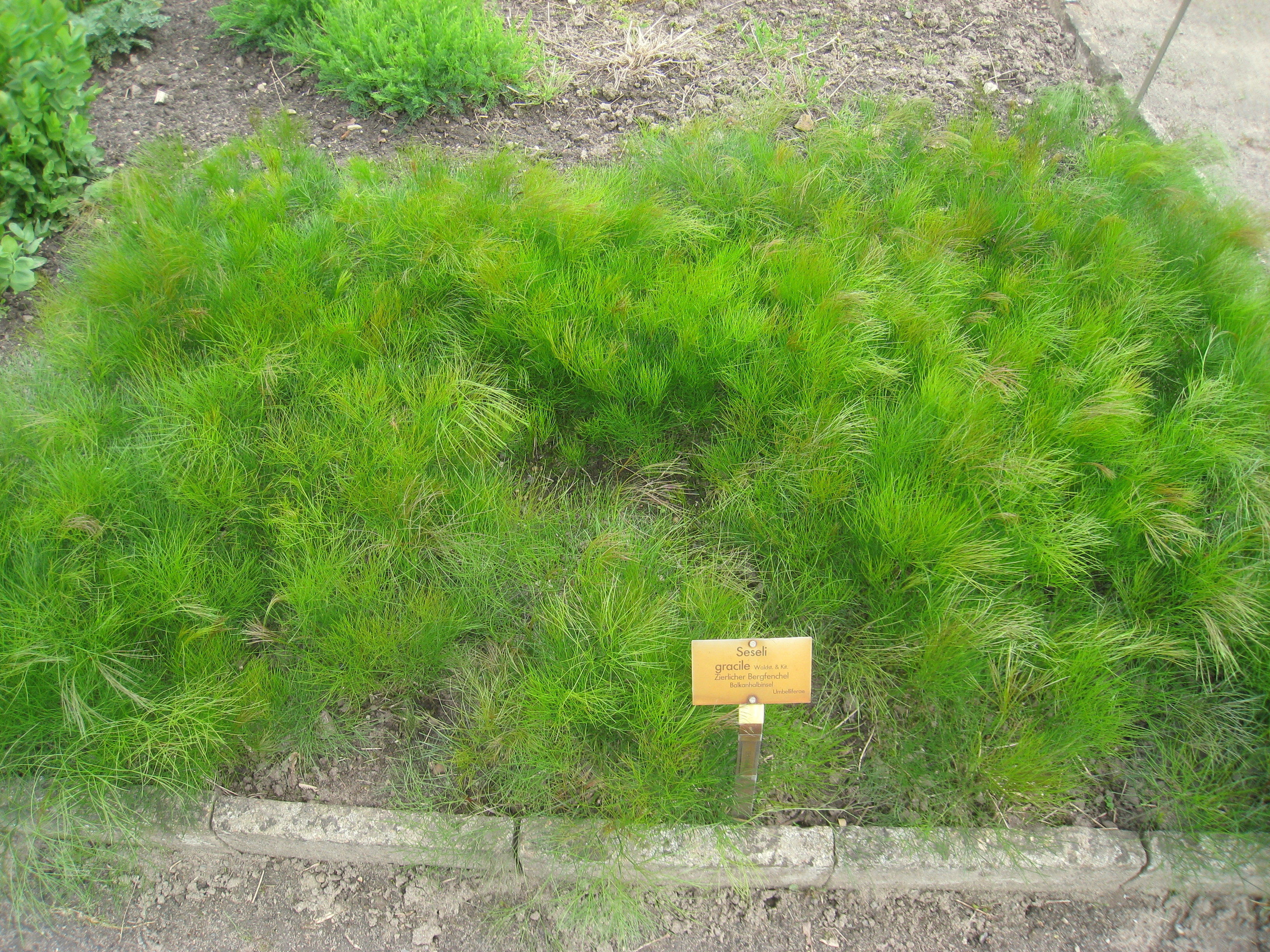 Seseli gracile specimen, in the Botanischer Garten, Berlin-Dahlem (Berlin Botanical Garden), Berlin, Germany.